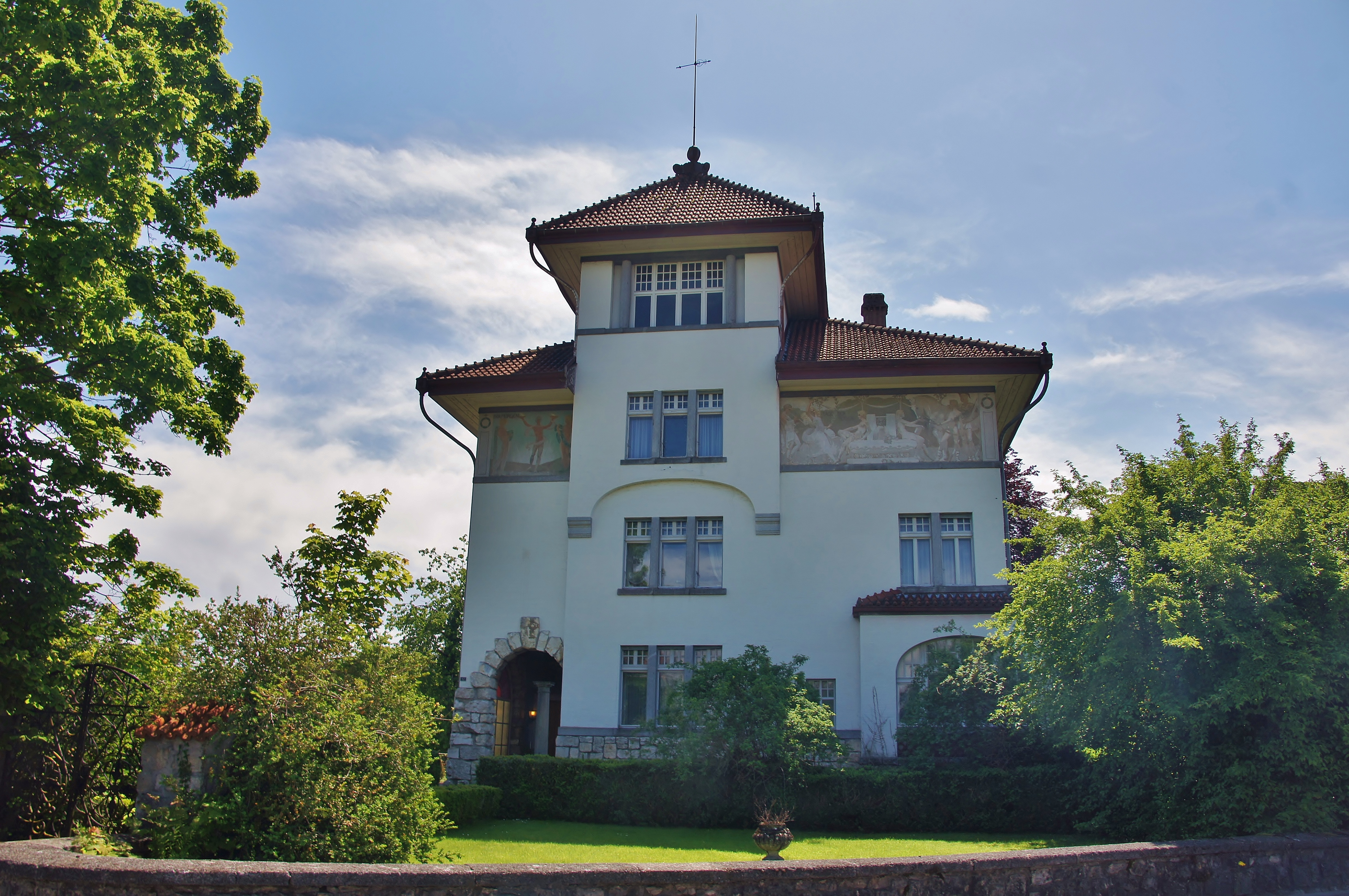 Nordansicht der ehem. Villa Gautschi